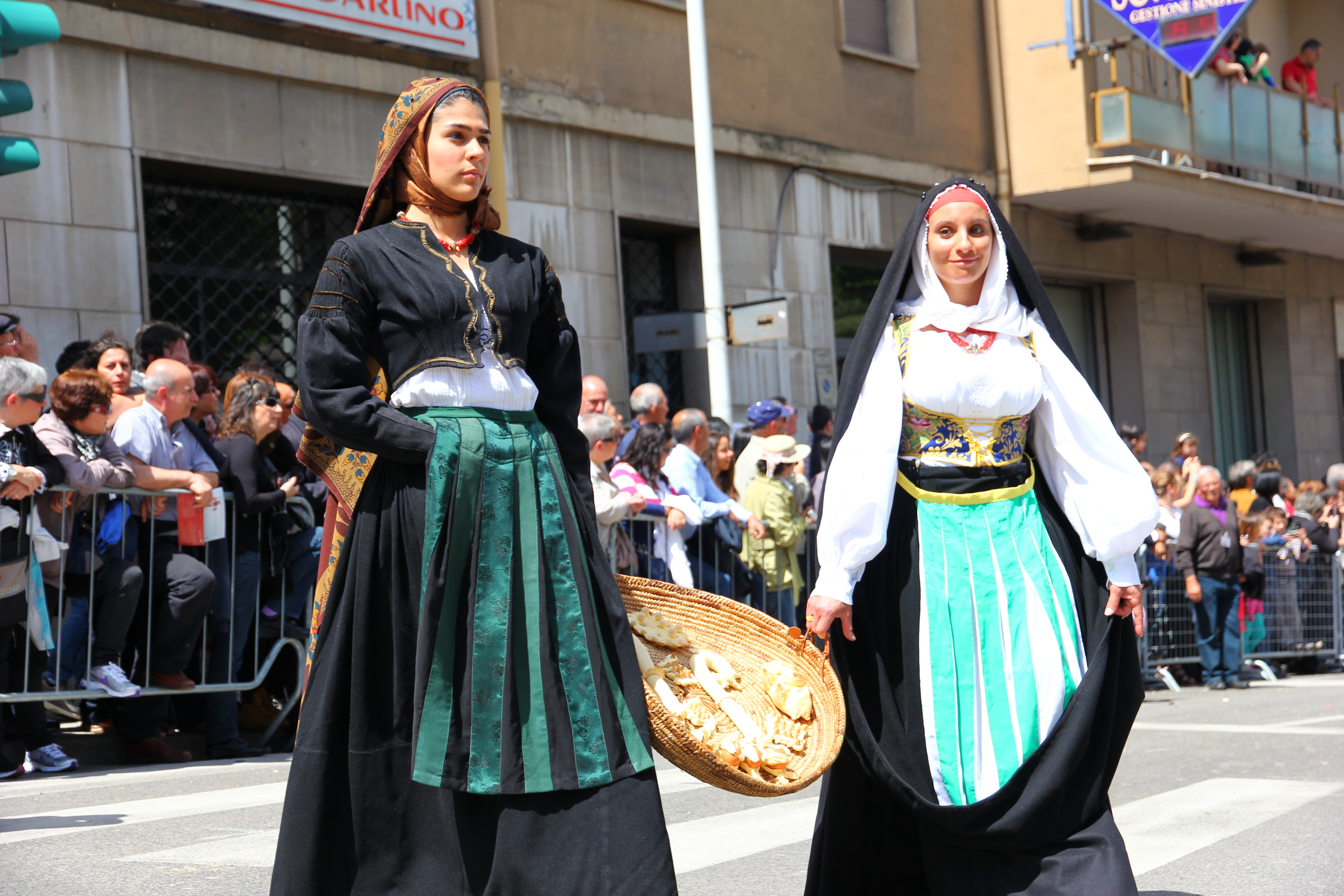 Cavalcata Sarda 2013 (Sassari)